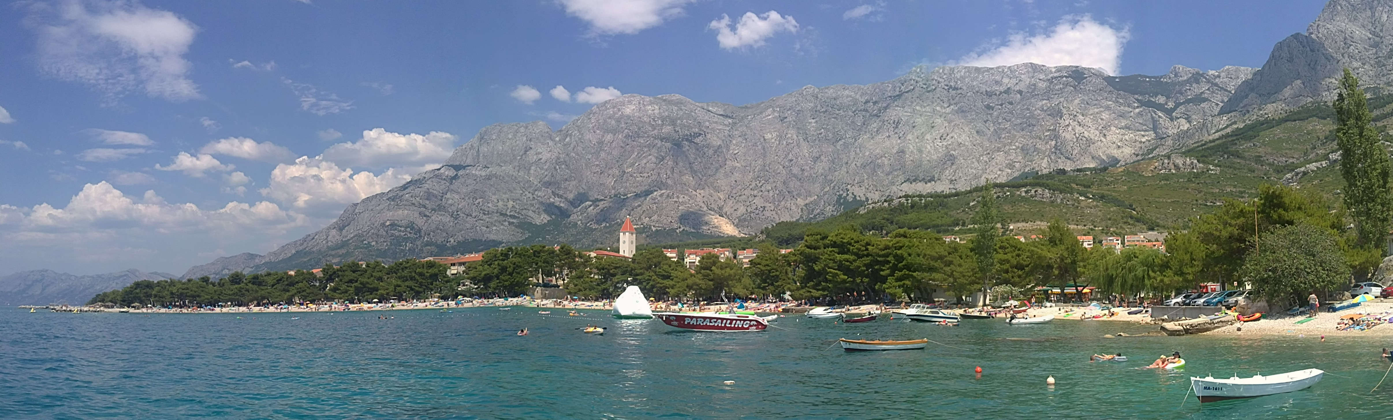 Panoráma strediska